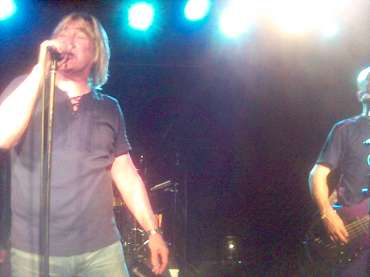 John Schlitt. Forsanger i Petra. Taget under deres sidste koncert i Danmark i 2005.